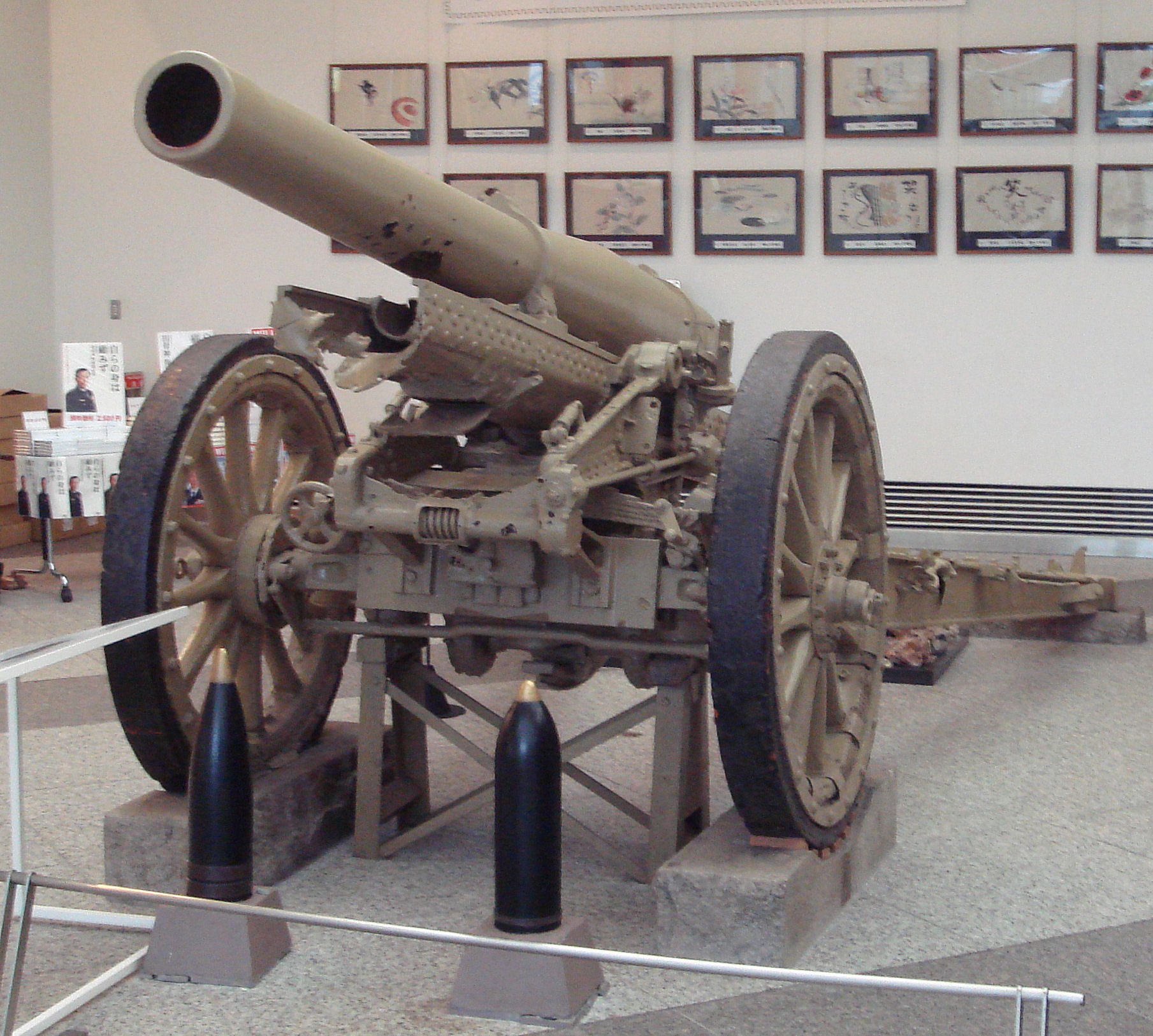 Model_96_(1936)_15cm_howitzer_Japan. Yasukuni Shrine.